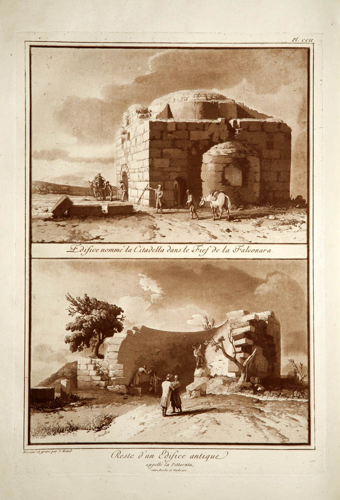 Trigona e Pitturata Houel